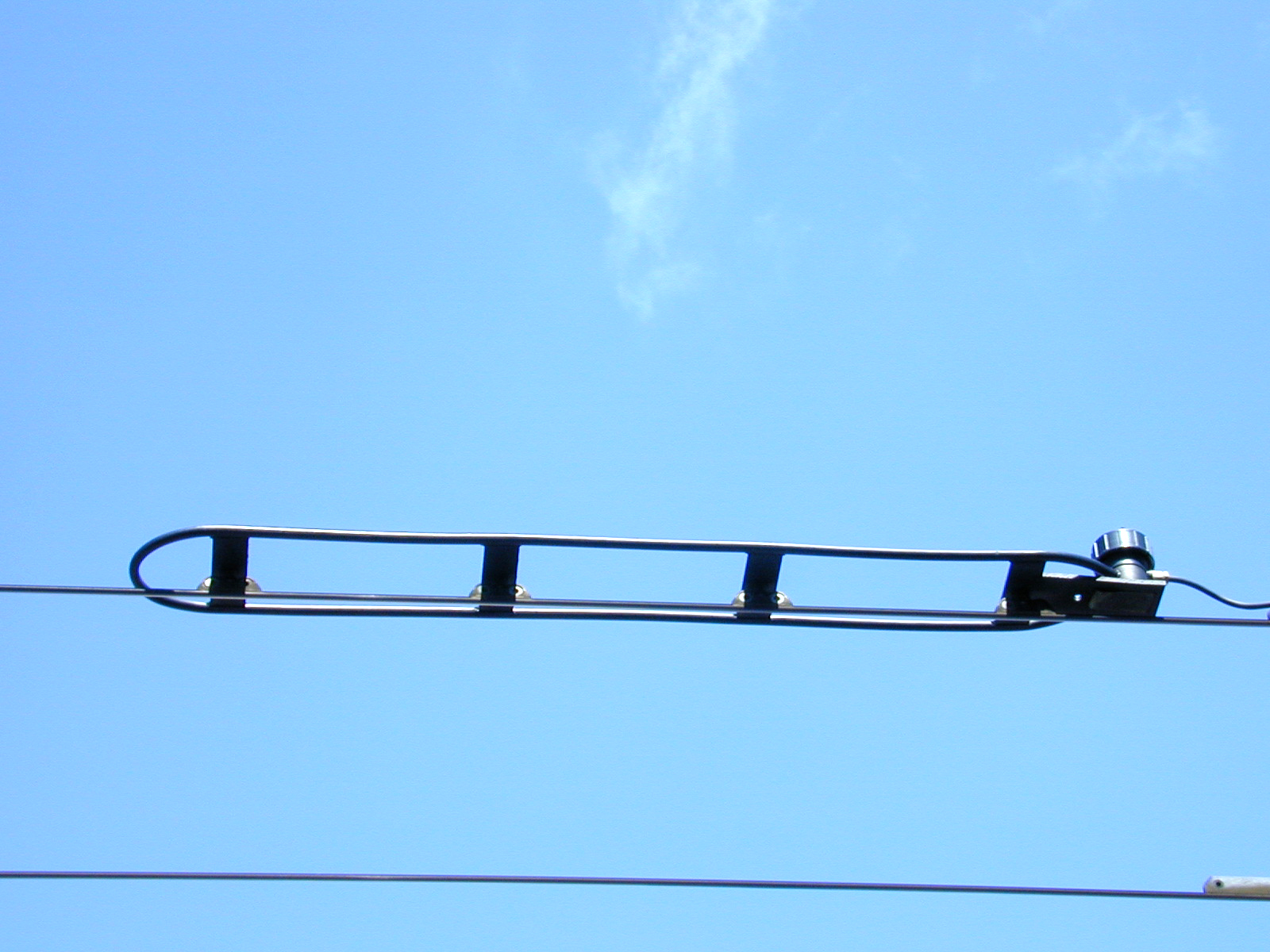 Bovenleiding schakelpunt van het Arnhems trolleybusnet.